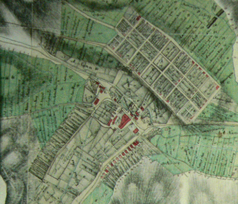 Lageplan von Grünenplan im 18. Jahrhundert